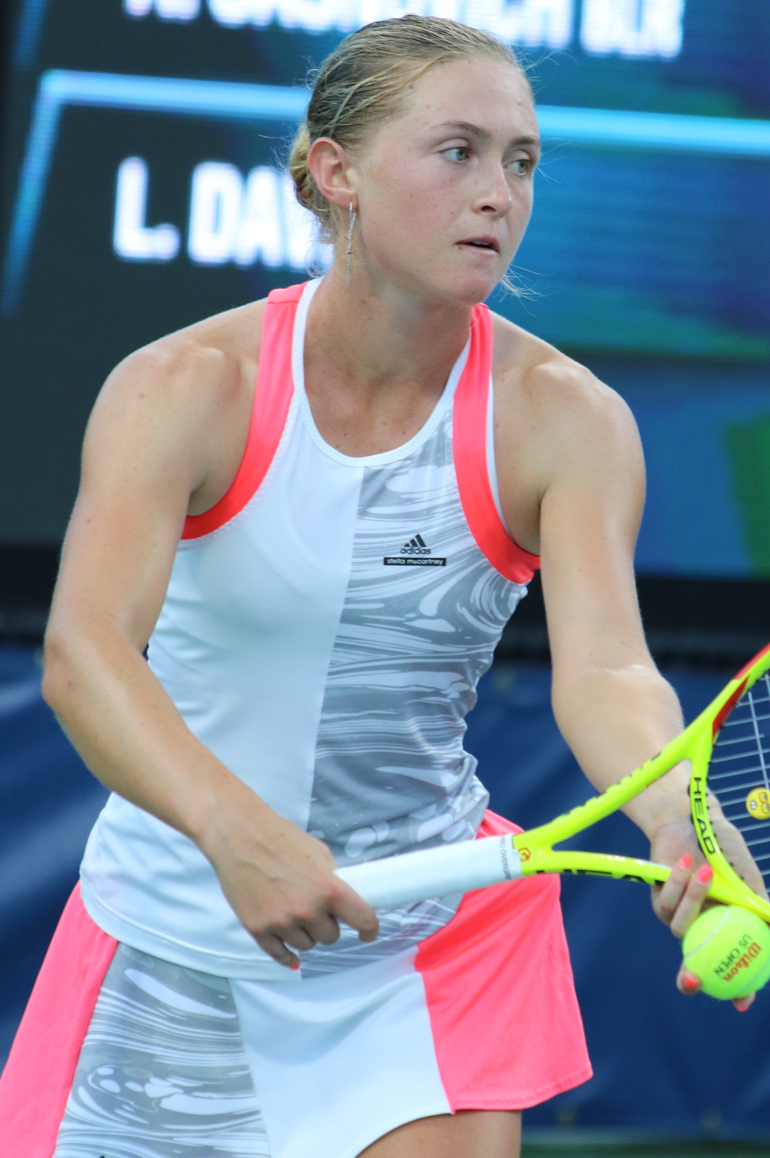 Sasnovich US16 (37)